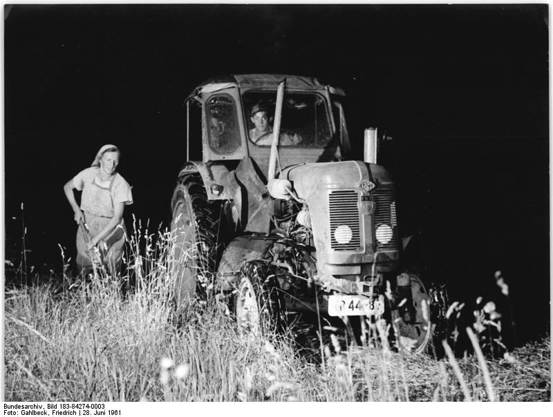 Rossau, Nachtarbeit, Heuernte Zentralbild Gahlbeck 28.6.1961 MTS Rossau im Kreis Haineichen hatte ihren Halbjahrplan für Feldarbeiten bereits am 17. Juni erfüllt. Daß sich die Traktoristen nicht auf ihren Lorbeeren ausruhen, beweist ihre Einsatzfreudigkeit während der Arbeitsspitzen bei der Heuernte. Sie werden dabei von Genossenschaftsbauern unterstützt, die als Schichttraktoristen mitarbeiten. UBz: Auch nach Einbruch der Dunkelheit arbeiten der Schichttraktorist Helmut Sachse, Genossenschaftsbauer einer Lpg vom Typ I, und Hilma Winkler aus der Geflügelfarm weiter, bis das Feld restlos gemäht ist.